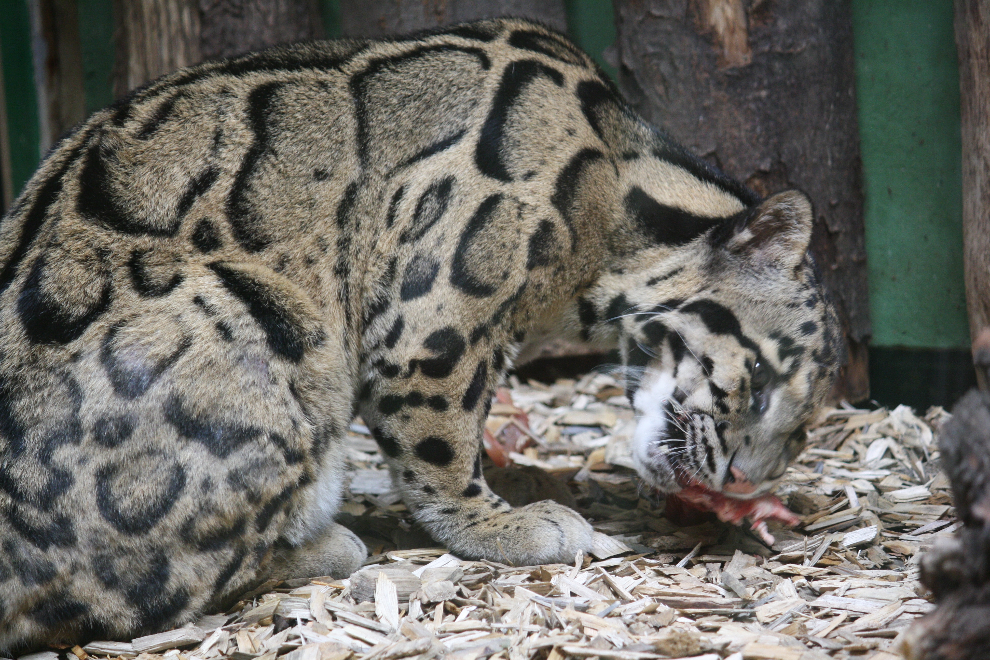 Zoo Praha